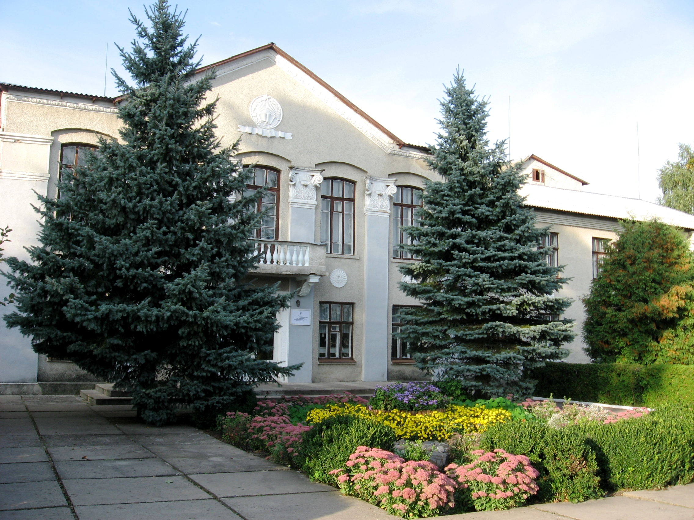 Маневичі, школа №1 (2010)